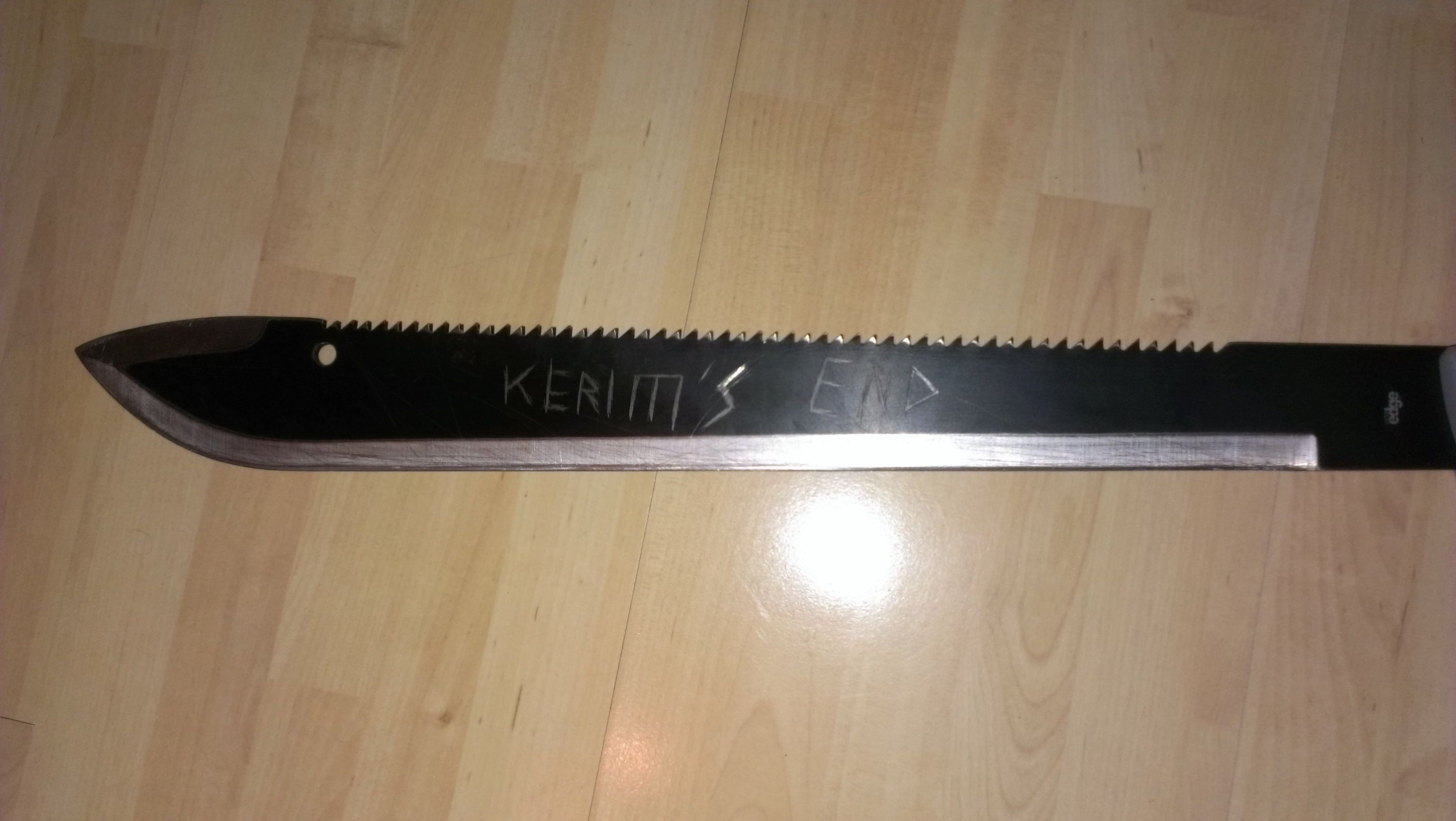 Kulumbianische Machetenklinge